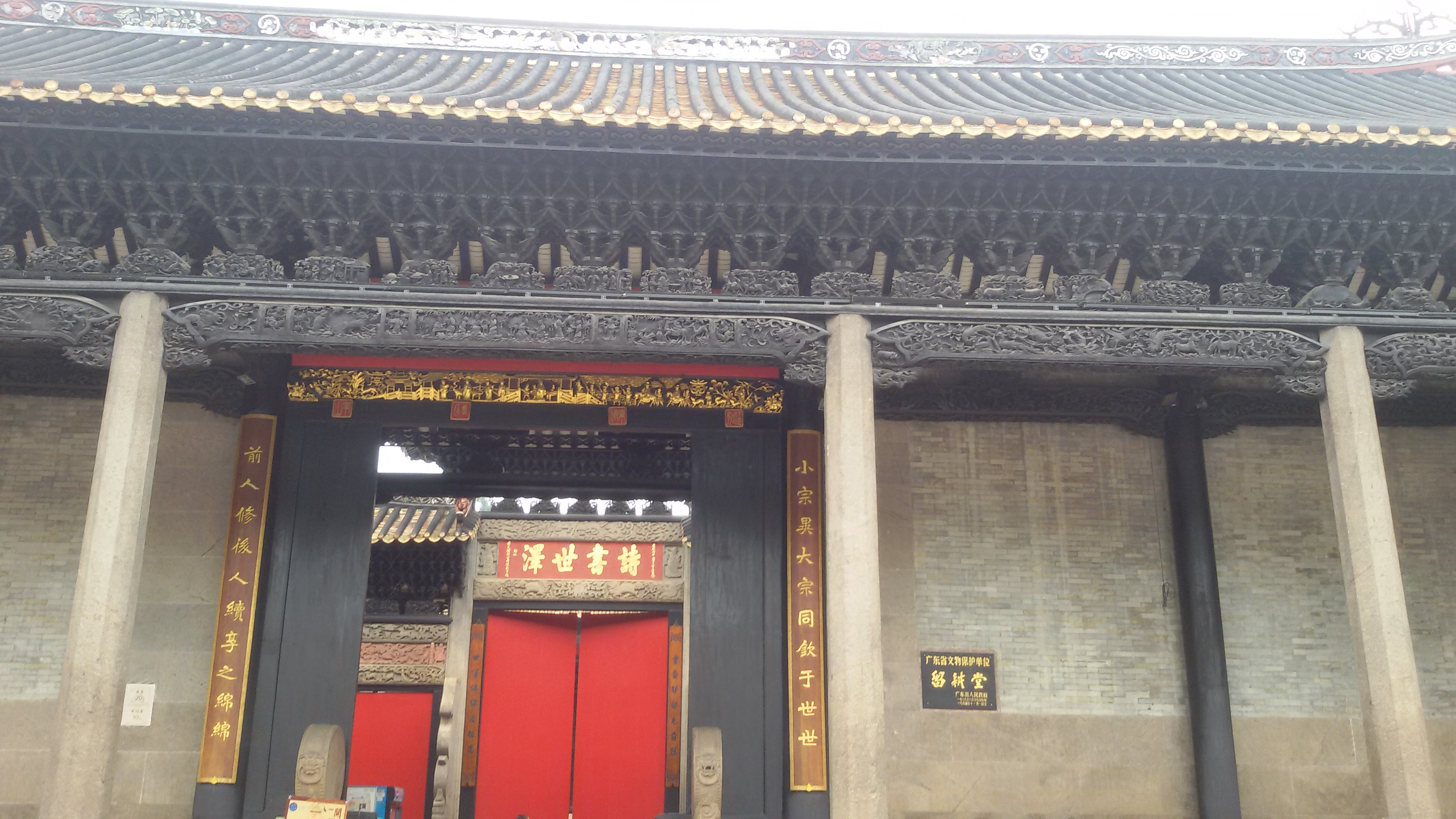 粵語: 沙灣留耕堂（何氏大宗祠）頭門